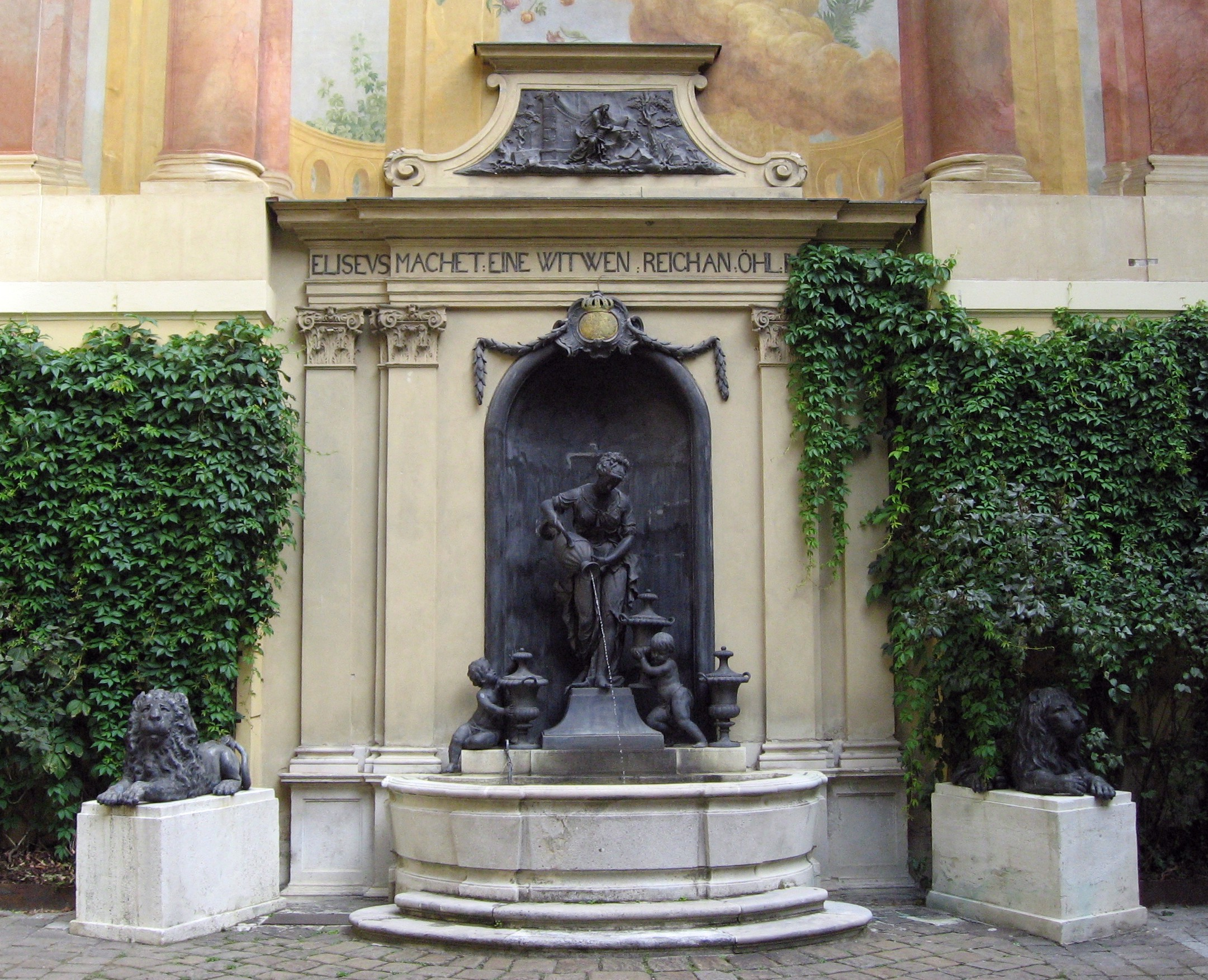 Wien, Witwe-von-Sarepta-Brunnen